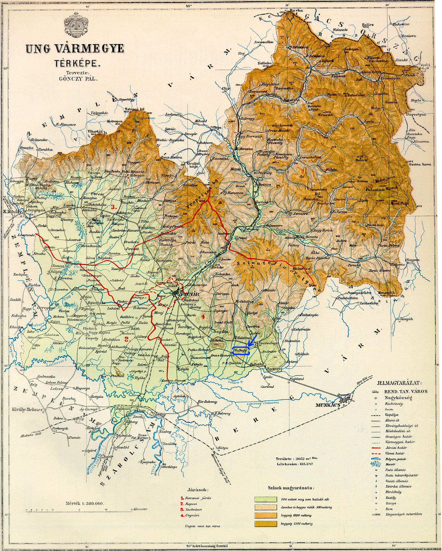 село Вовкове (Valkaja ) на старій карті.